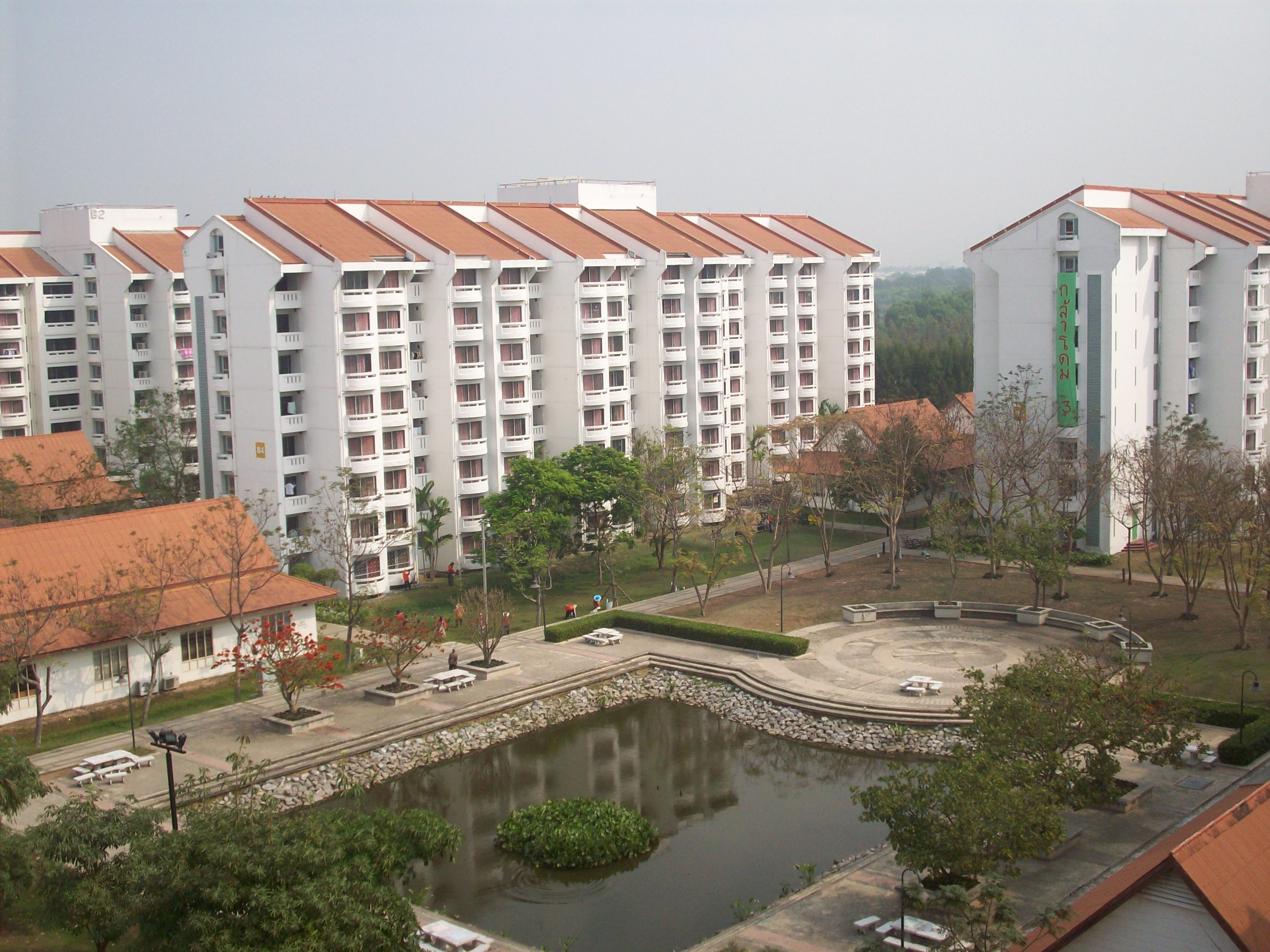 กลุ่มอาคารหอพักนักกีฬาเอเชียนเกม ม.ธรรมศาสตร์ ศูนย์รังสิต